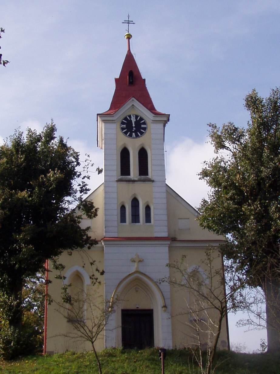 Kostel sv. Cyrila a Metoděje v Ohnišově